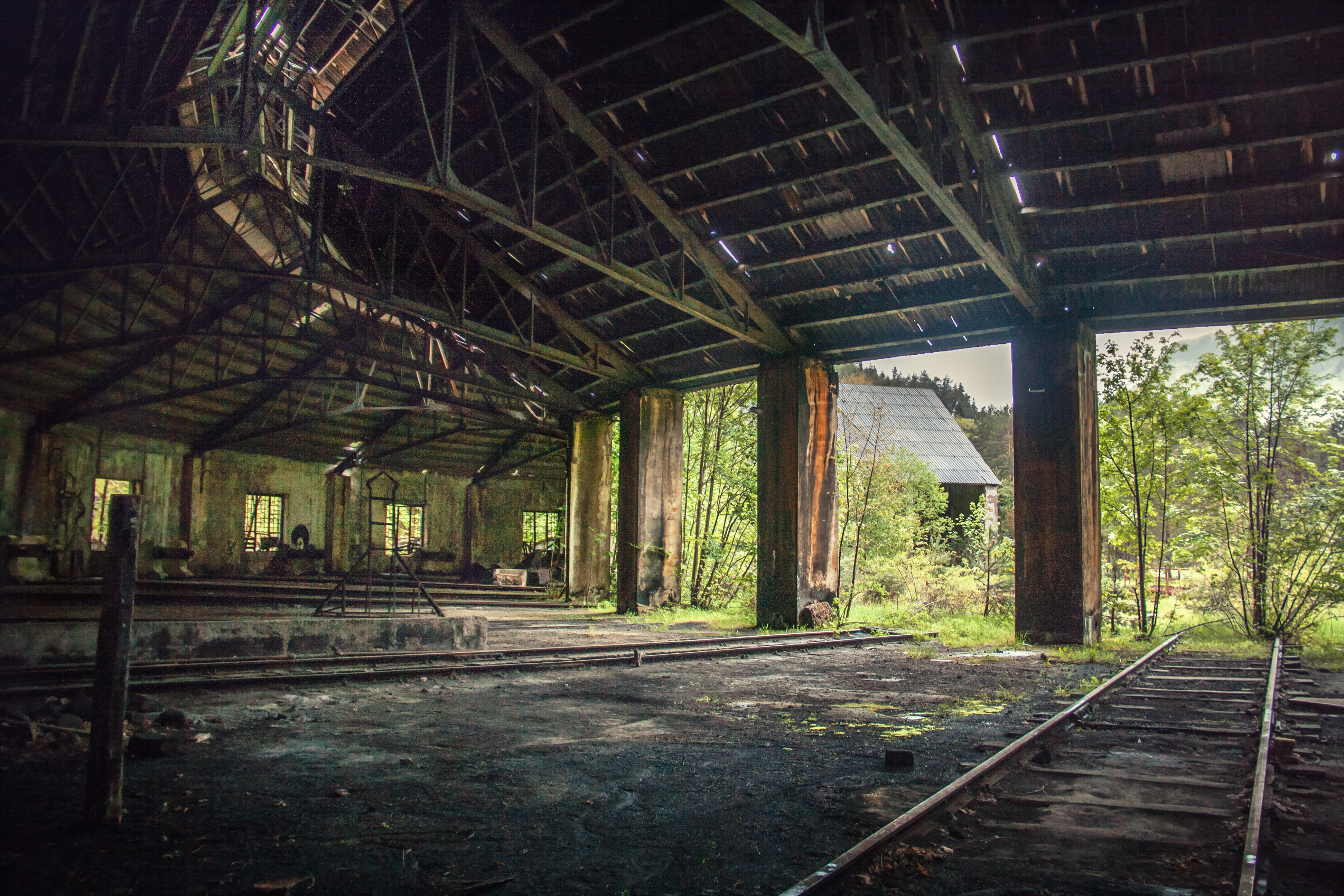 Canfranc, España